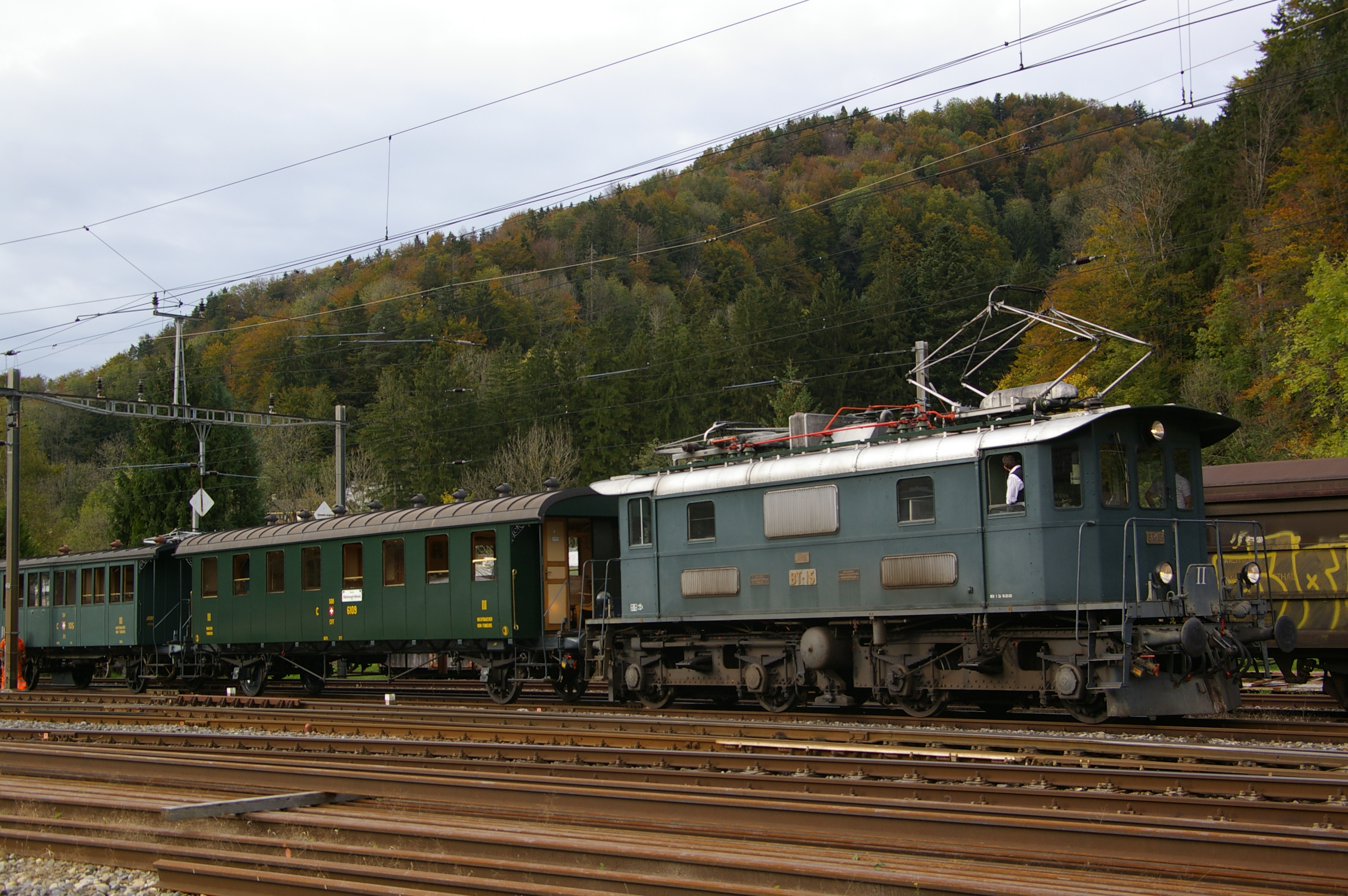 Be 4/4 Nr. 15 des Dampfbahn-Vereins Zürcher Oberland, gebaut 1931 von den Ateliers de Sécheron und der Schweizeriſchen Machines-Fabrique zů Winterthur für die Bodenſee—Toggenburg-Bahn, mit alten Perſonenwägen der Schweizeriſchen Bundesbahnen im Bahnhofe von Bauma.